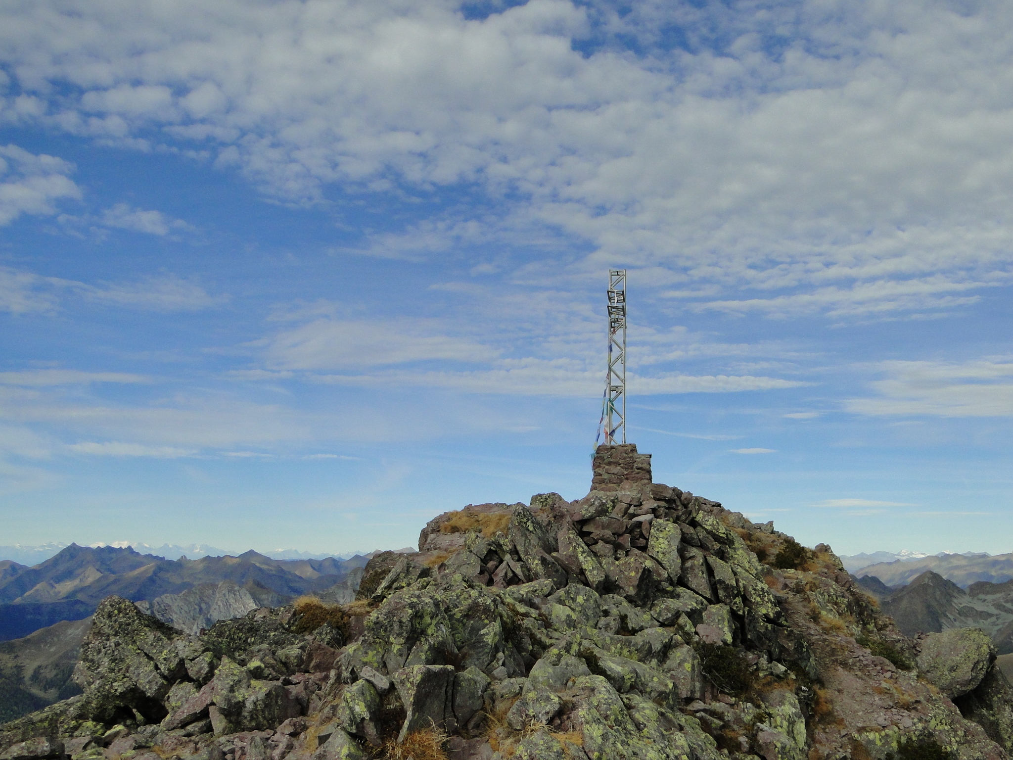 Pizzo del Becco, prealpi Orobie, valle Brembana, Bergamo